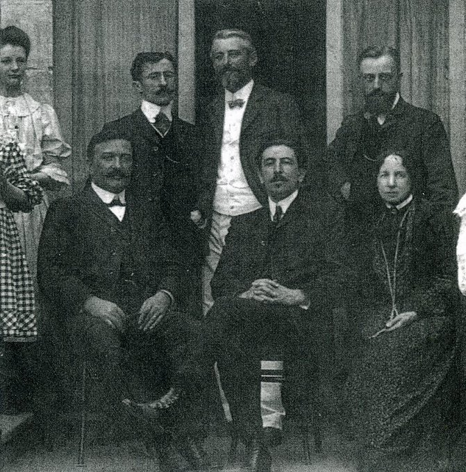 Emile Gaucher est debout derrière E. Fougerat au centre. Source Les Annales de Nantes et du Pays Nantais. Numéro 290. 2003